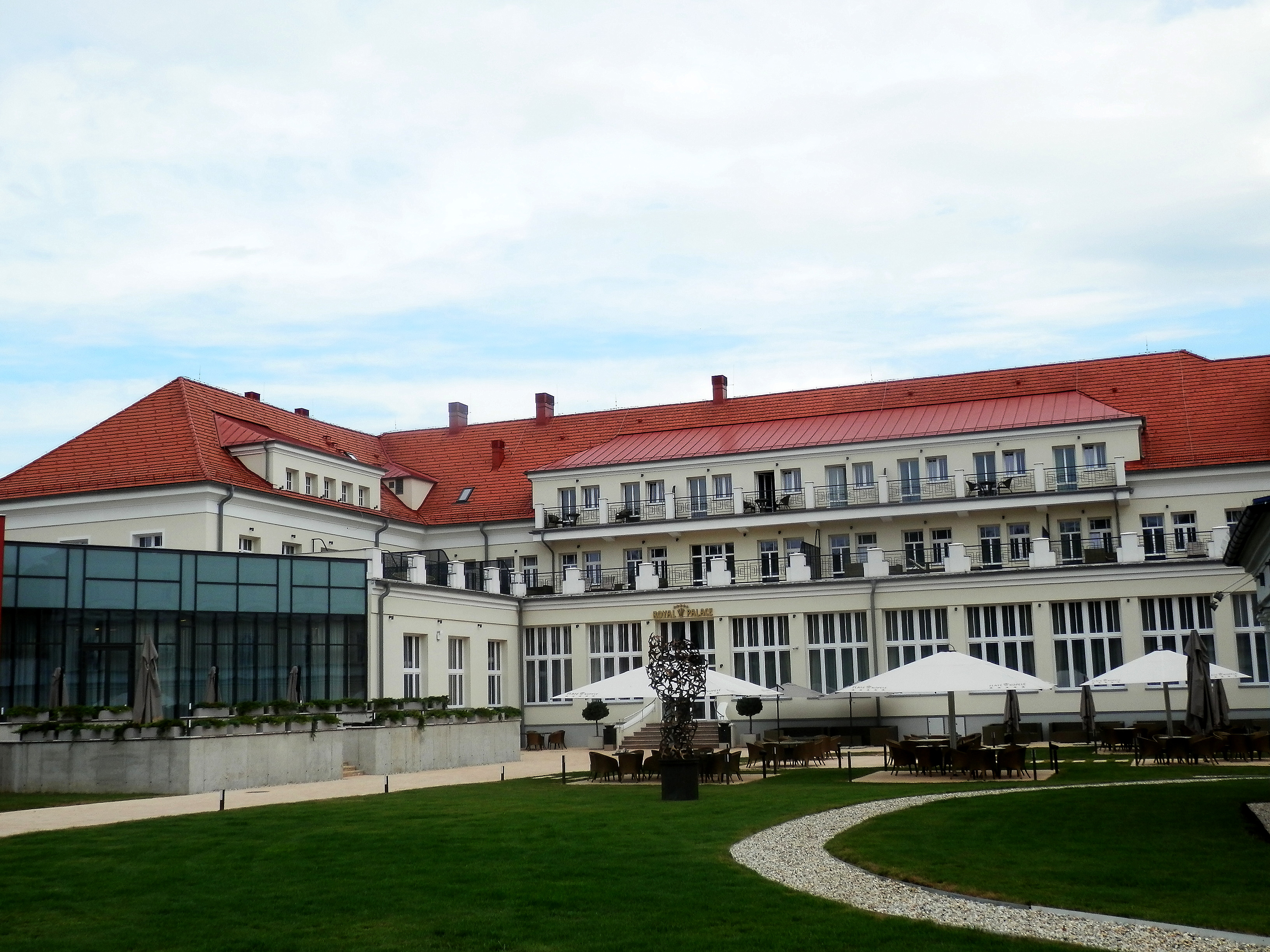 Jún 2019. Kúpeľné a okresné mesto Turčianske Teplice. Slovensko.